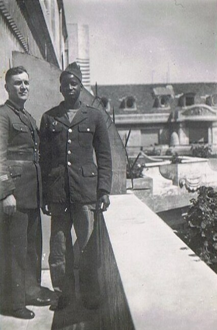 Les façades sud du « Majestic » alors hôpital militaire géré par le capitaine Marcel Payan (1909-2006) pris en photo par son épouse avec son ordonnance l'infirmier Amadou Amadi des Tirailleurs sénégalais.